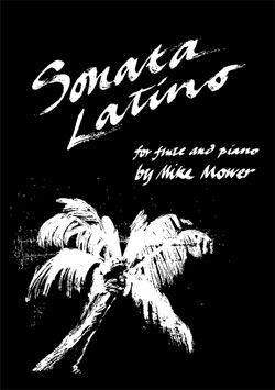 Portada